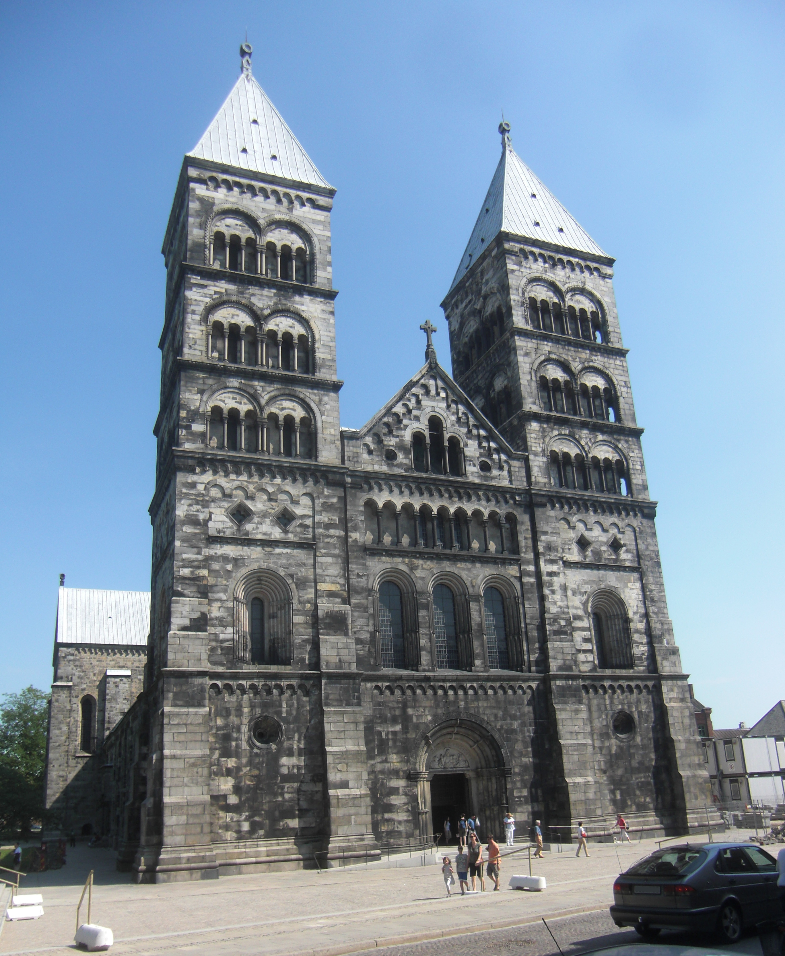 Lunds domkyrka, Lund, Skåne, Sverige.